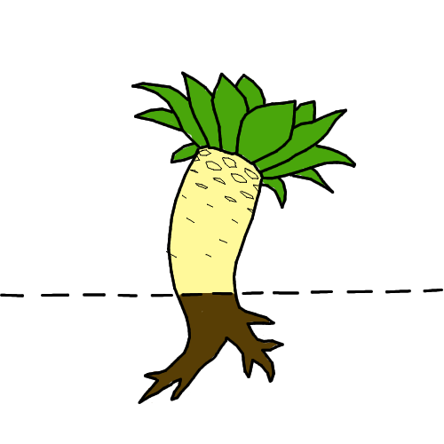 Morfología del tallo. Tipo: caudex. Según Simpson (2005) Plant Systematics